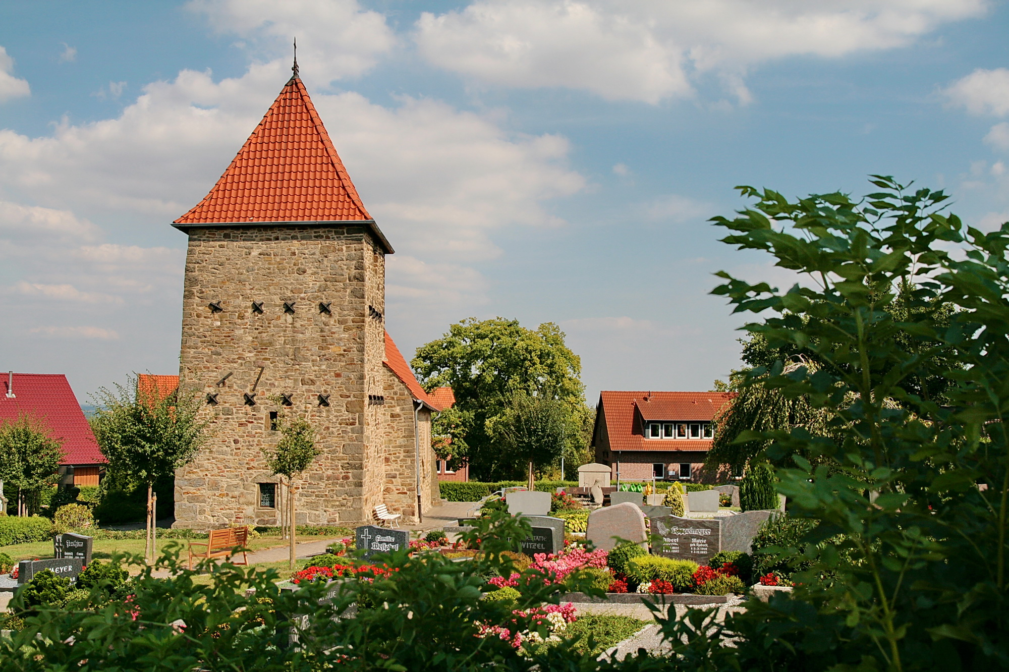 Kirche der Alexandri-Gemeinde in Bantorf (Barsinghausen), Niedersachsen, Deutschland